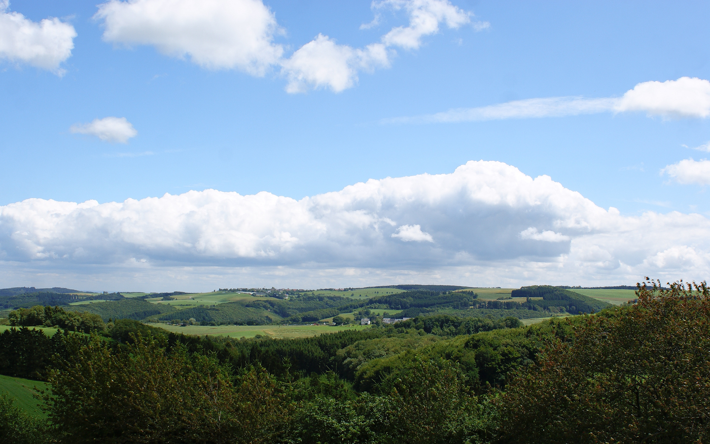 Lauperath, Eifelkreis Bitburg-Prüm, Rheinland-Pfalz